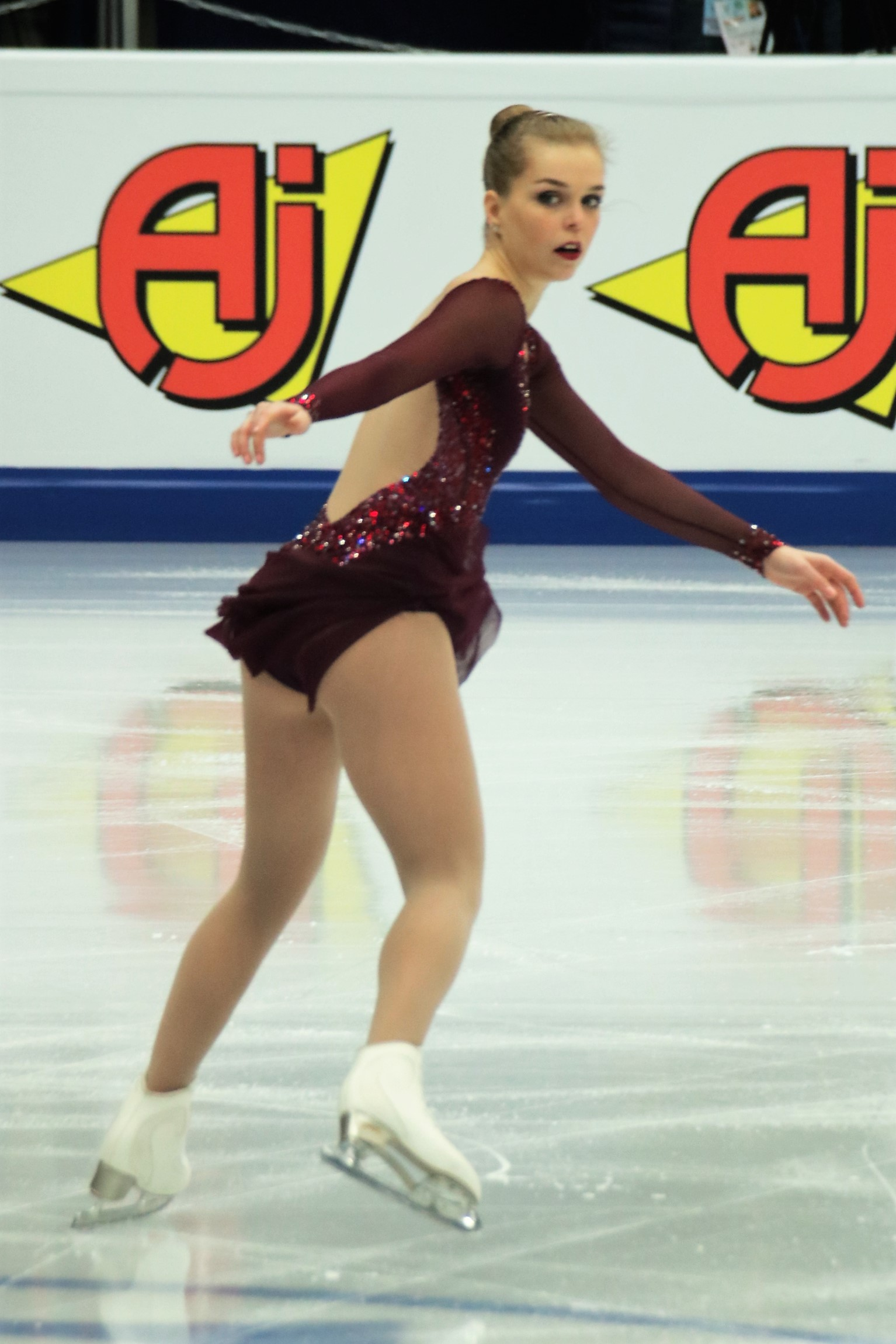 Николь Райичова (Словакия) на Чемпионате Европы по фигурному катанию 2018.